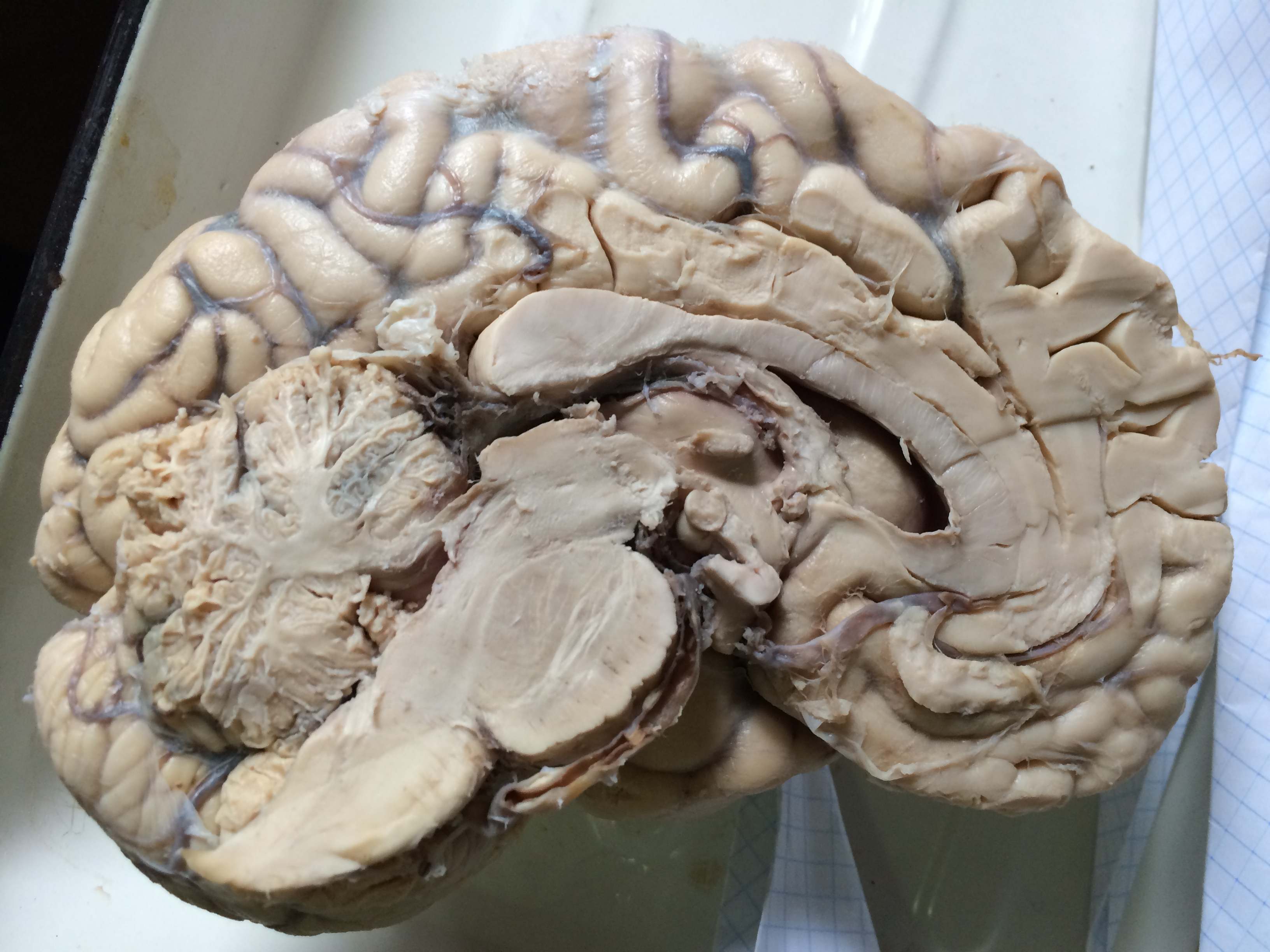 Людський мозок